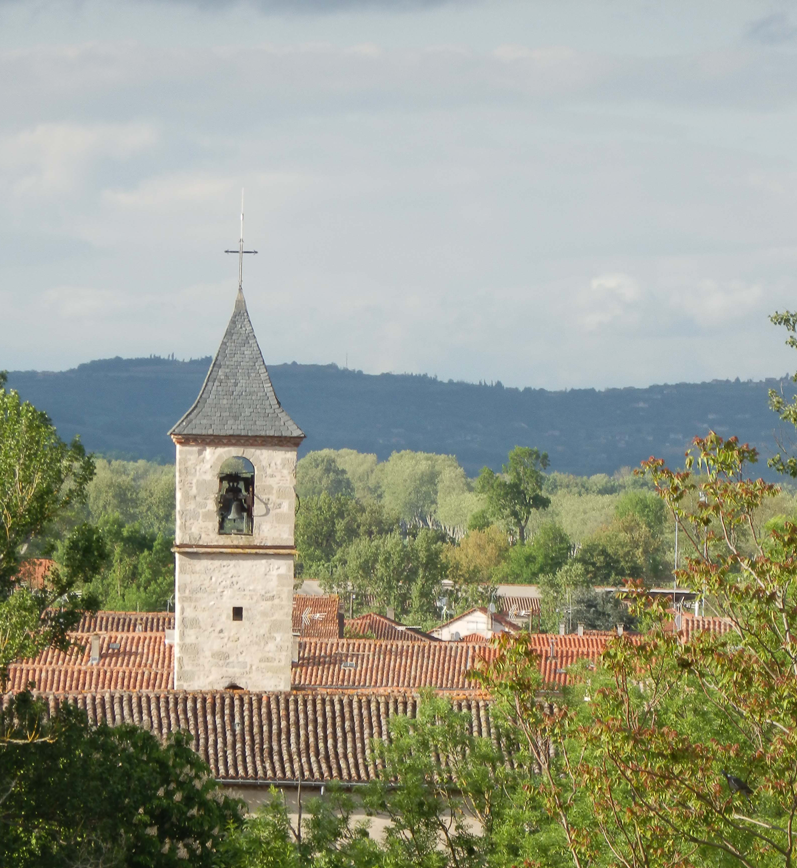 Vue du clocher de Vielmur sur Agout